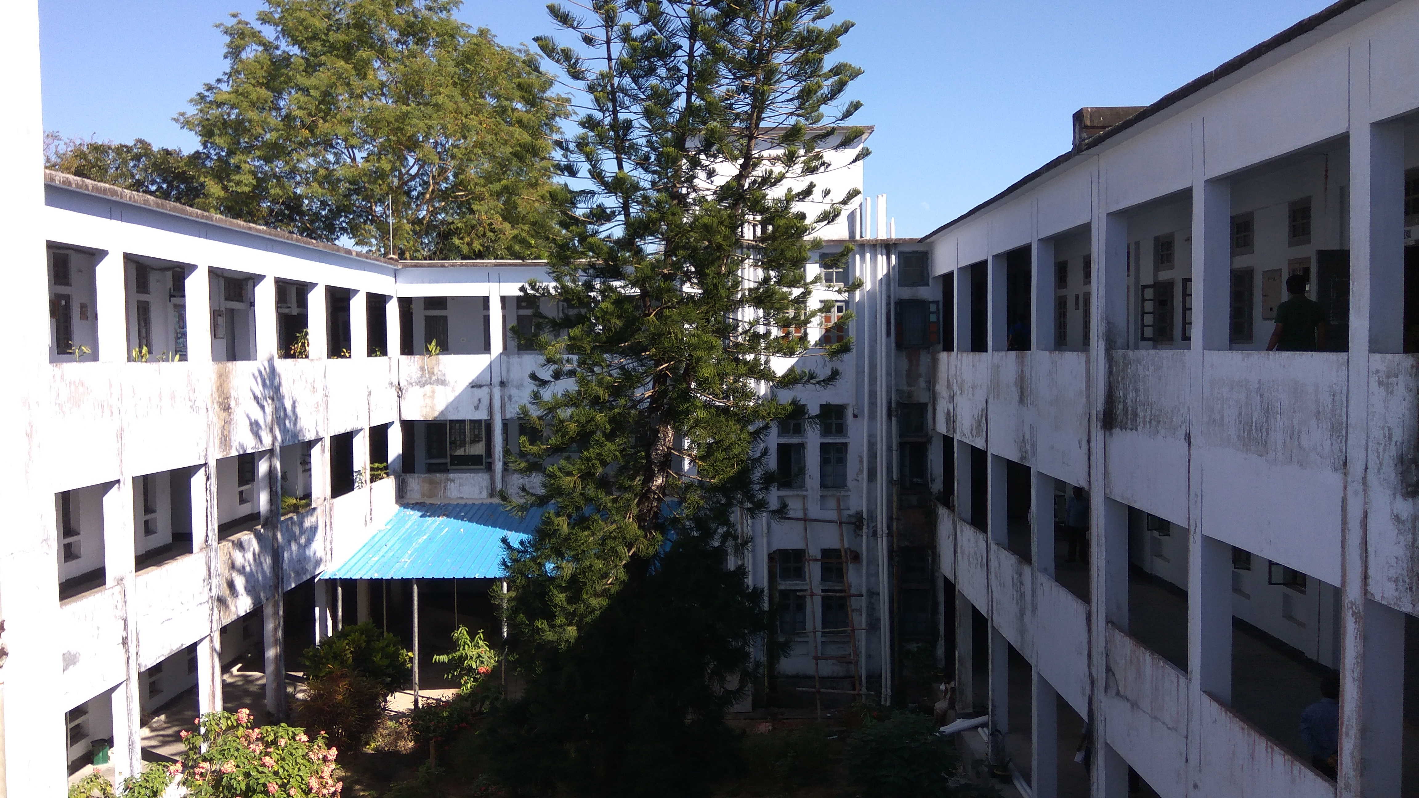 সিভিল ইঞ্জিনিয়ারিং ভবন, চুয়েট